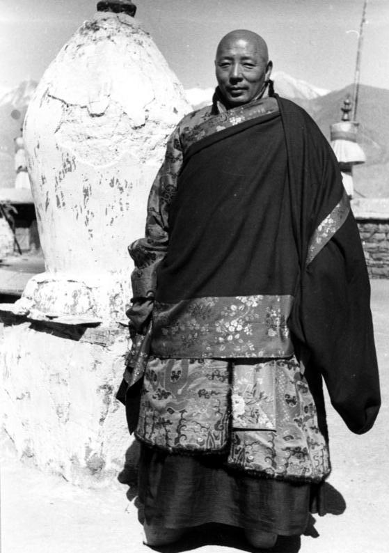 Lhasa, das Staatsorakel